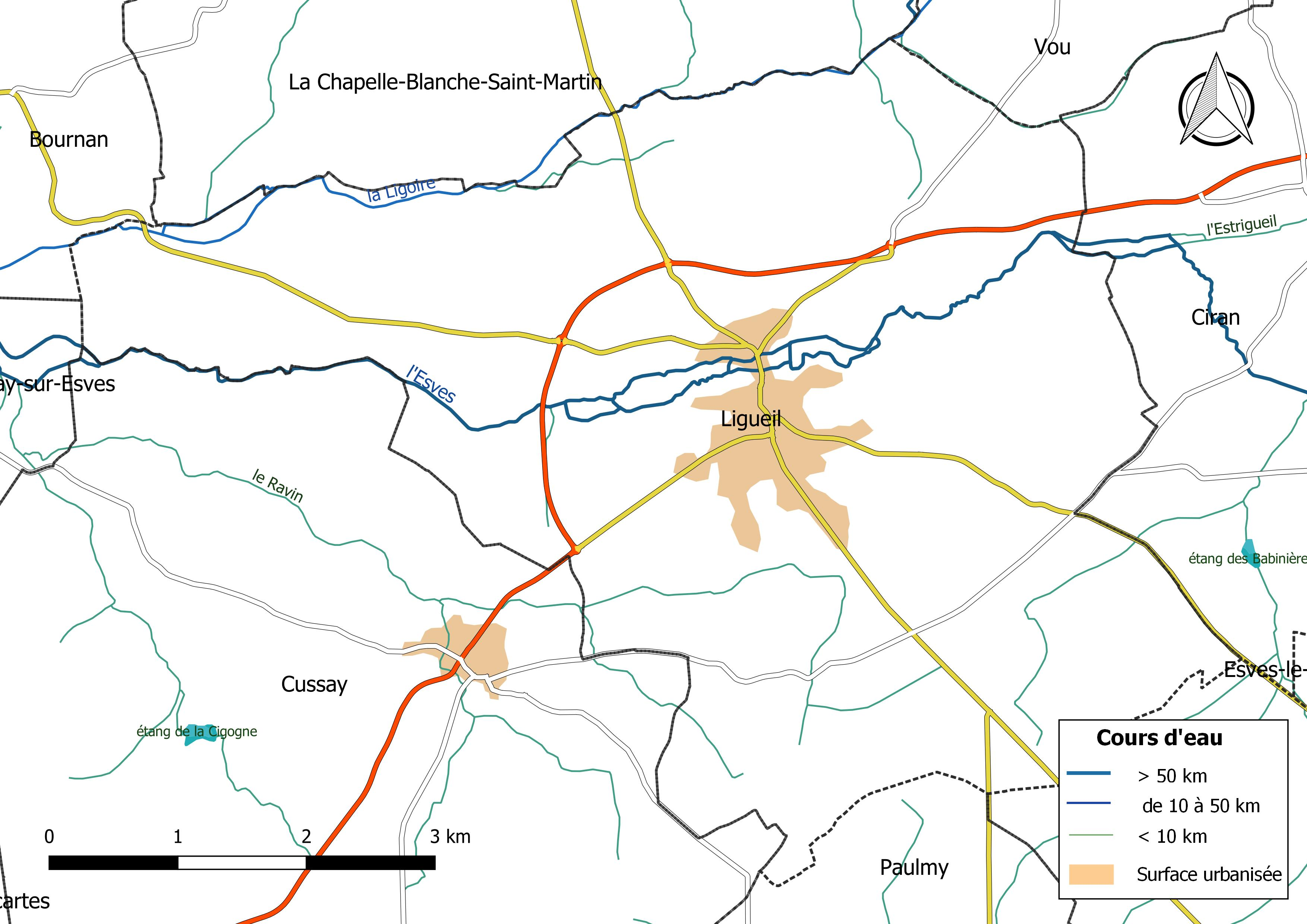 Carte du réseau hydrographique de la commune de Ligueil (France).